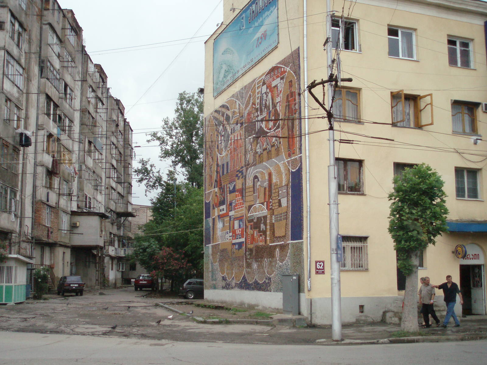 Kutaisi